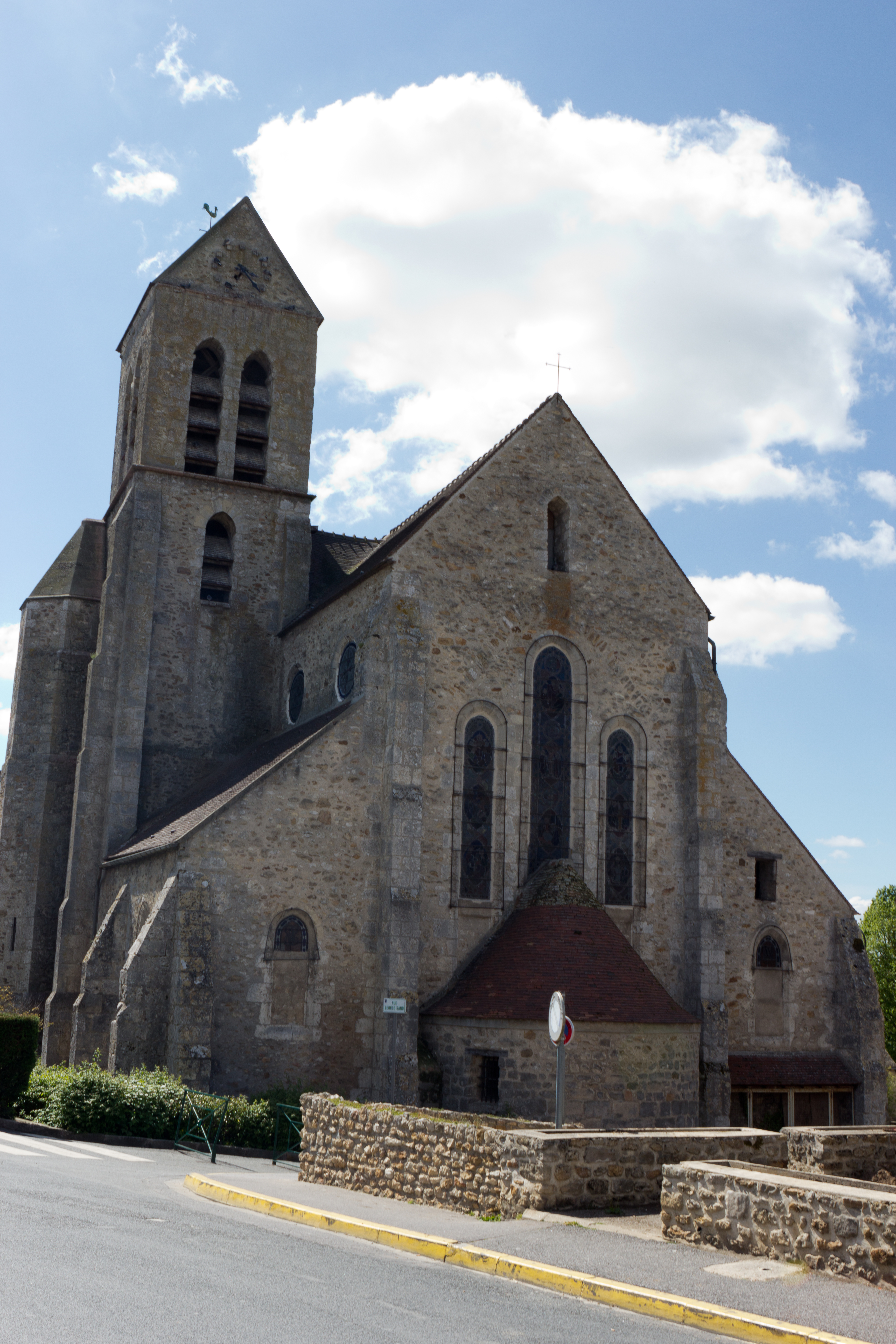 Église d'Itteville, Itteville, département de l'Essonne, France.